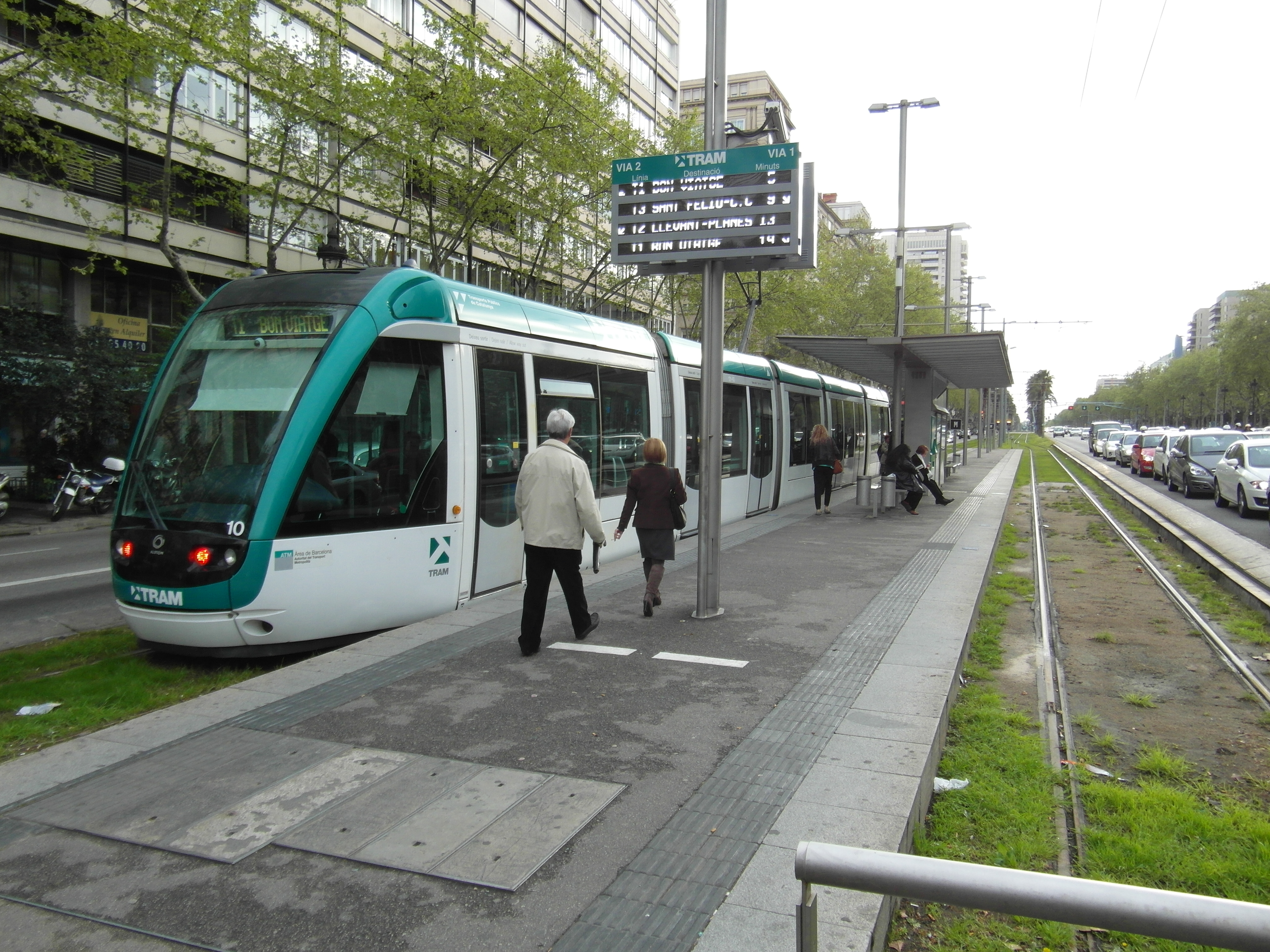 Barcelona - Trambaix